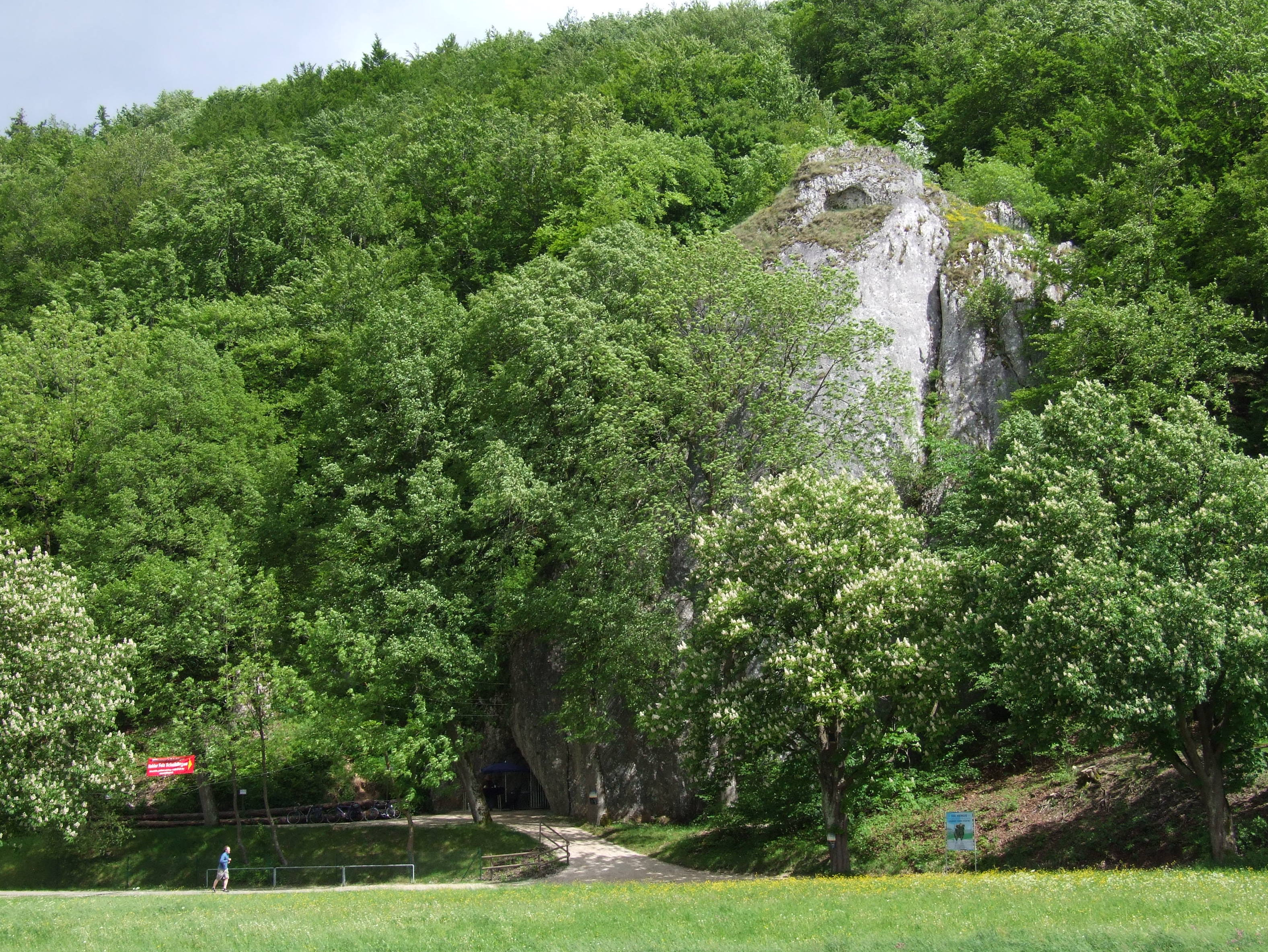 Der Hohle Fels im Achtal bei Schelklingen, Schwäbische Alb, Süddeutschland